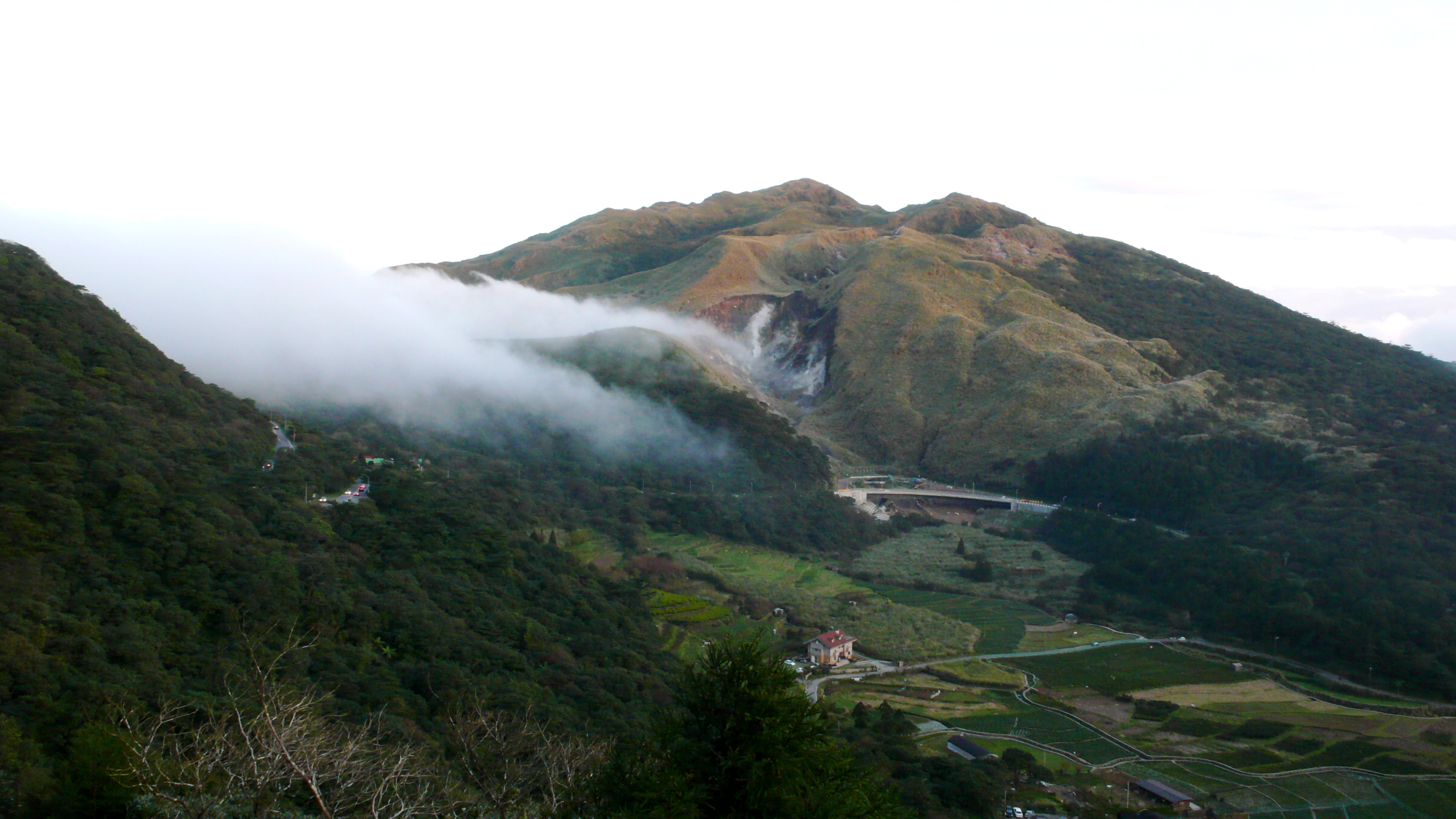 陽明山小油坑